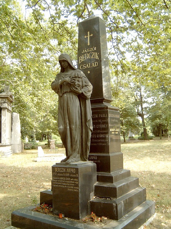 Berczik Árpád (Temesvár, 1842. július 8. – Budapest, 1919. július 16.) novellista, színműíró sírja Budapesten. Kerepesi temető: 19/1-1-6 [szobrász: Kisfaludi Strobl Zsigmond]